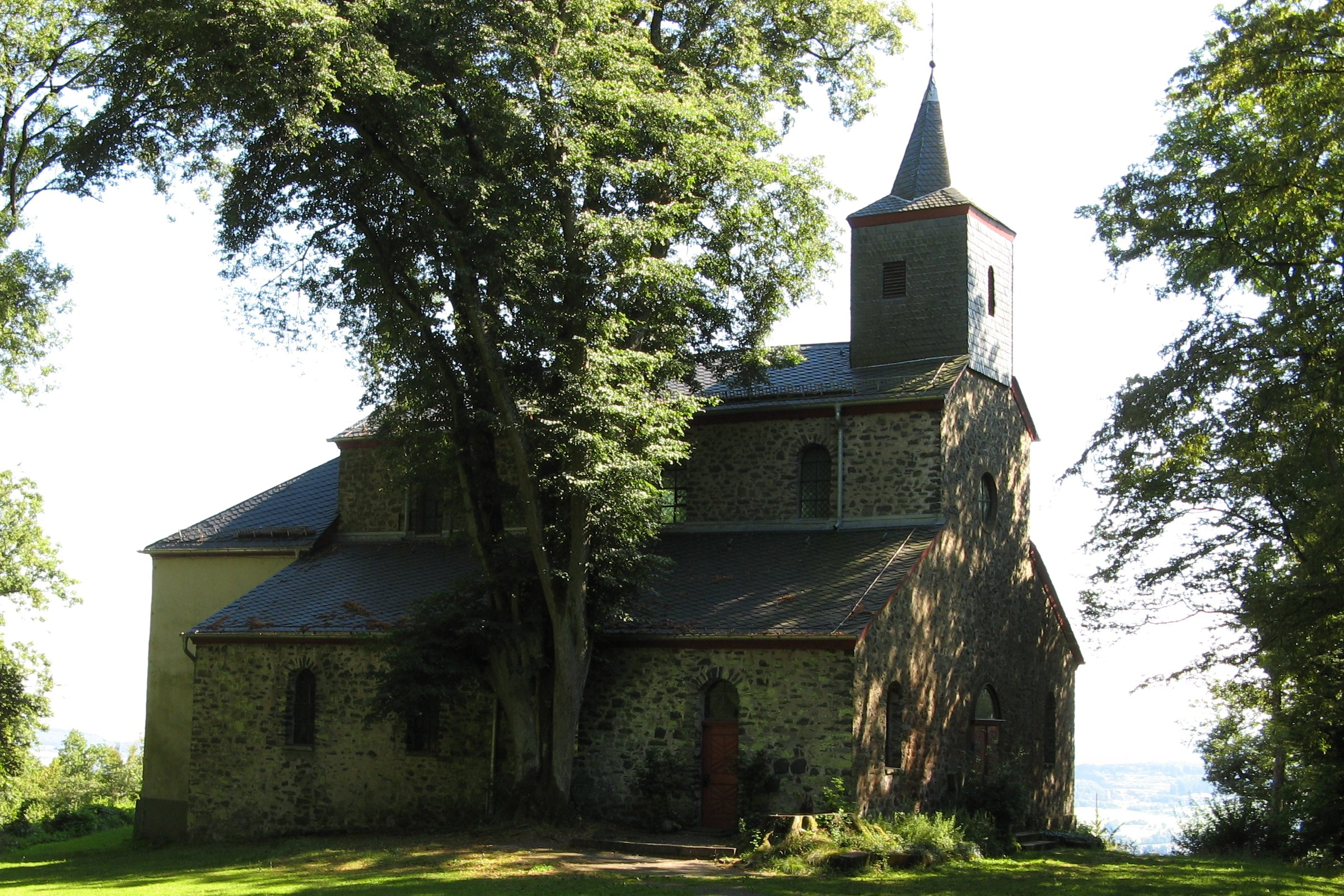 Die Blasiuskapelle bei Frickhofen, Hessen, Deutschland